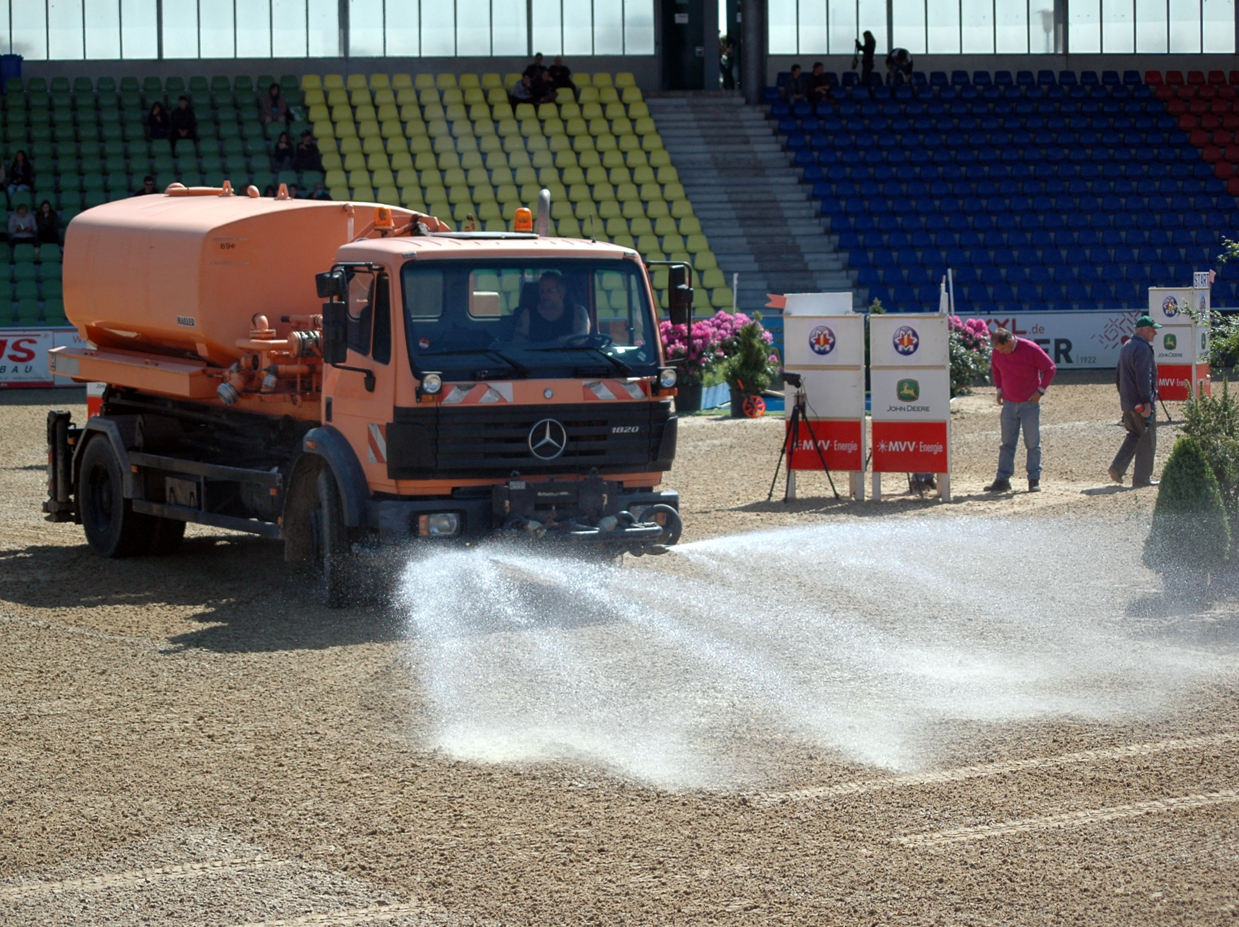 Sprengwagen